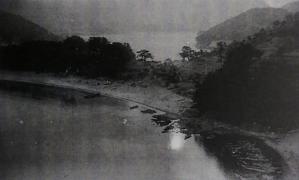 島根県隠岐郡黒木村（現・西ノ島町）美田船引にある地峡。1914年以後に船引運河が開削された。